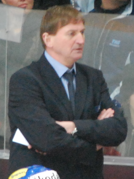 Alois Hadamczik in Tampere.